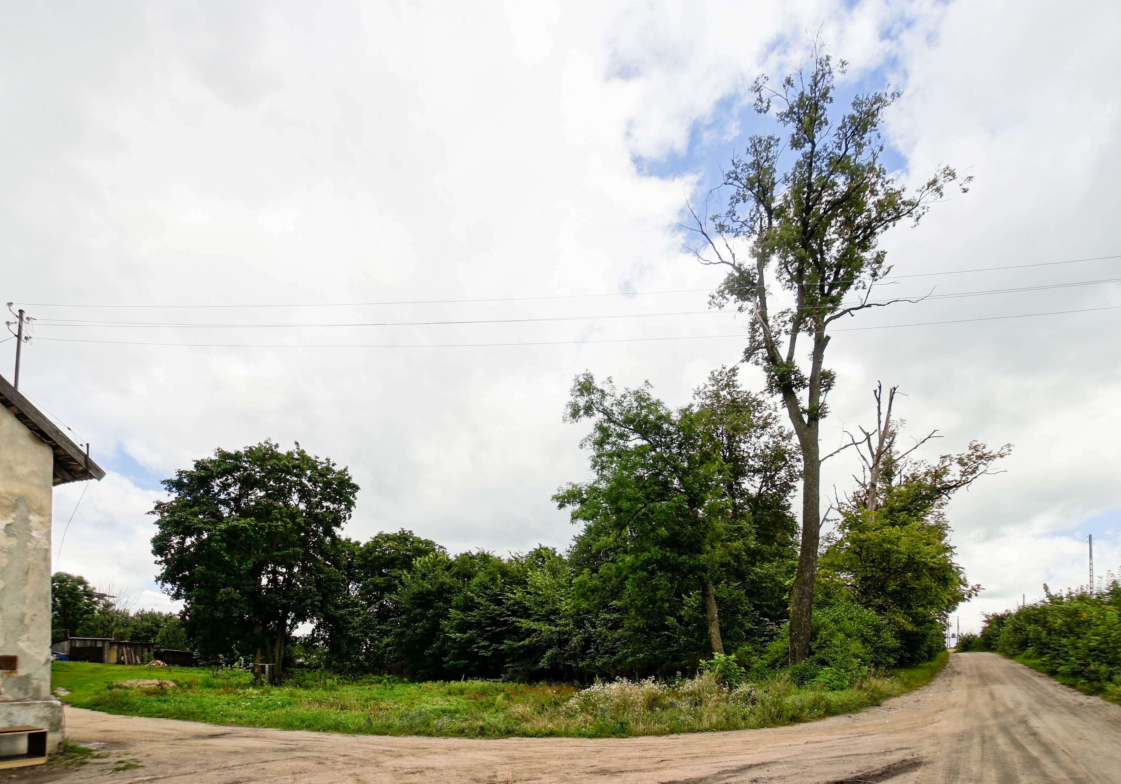 Zabytkowy park dworski w Skowronkach. 11.1988.